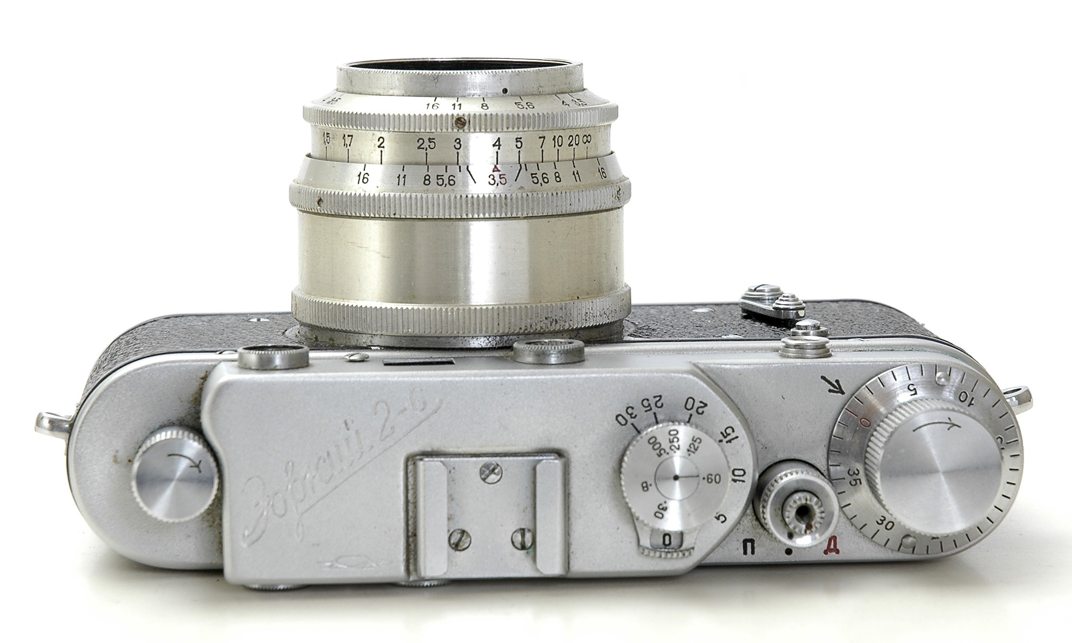 Фотокамера Зоркий 2С